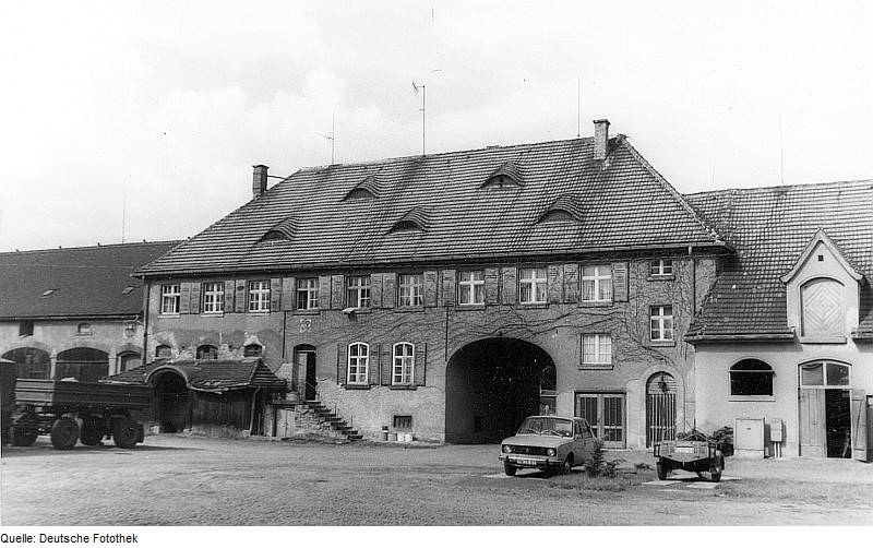 Original image description from the Deutsche Fotothek Großdubrau-Kauppa. Ehem. Rittergut